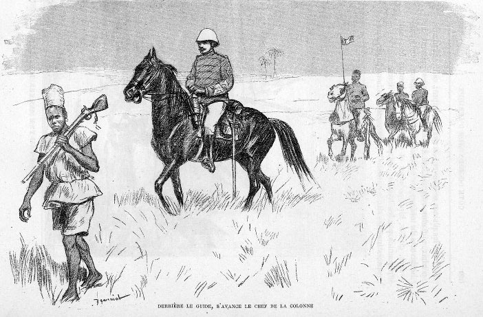 Chasse au Sénégal (Illusration de Côte occidentale d'Afrique du Colonel Frey, Pl. en reg. p.18 "Derrière le guide, s'avance le chef de la colonne". [Cote : Réserve A 200 386])